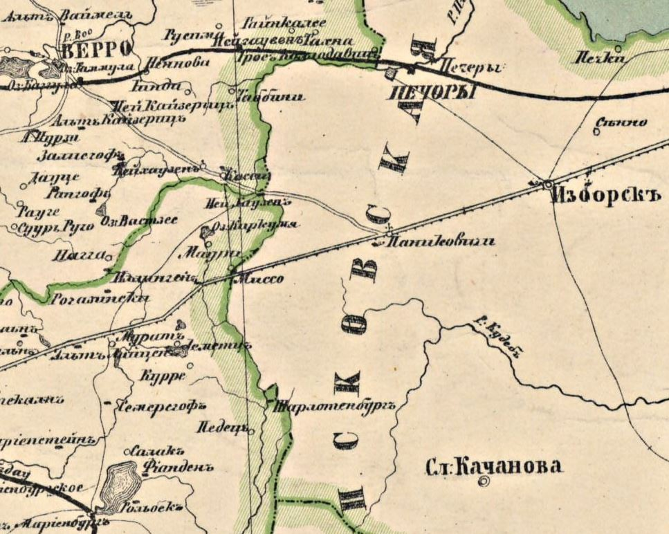 Село Паниковичи Псковской губ. на карте Лифляндской губернии, СПб:Картографическое заведение Ильина, конец XIX в.